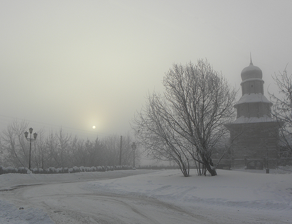 Сильный мороз (-42С).